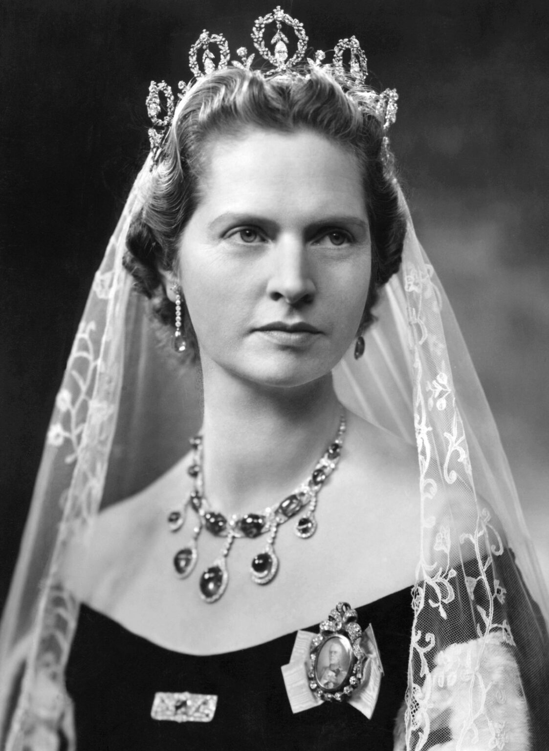 Prinsessan Sibylla.